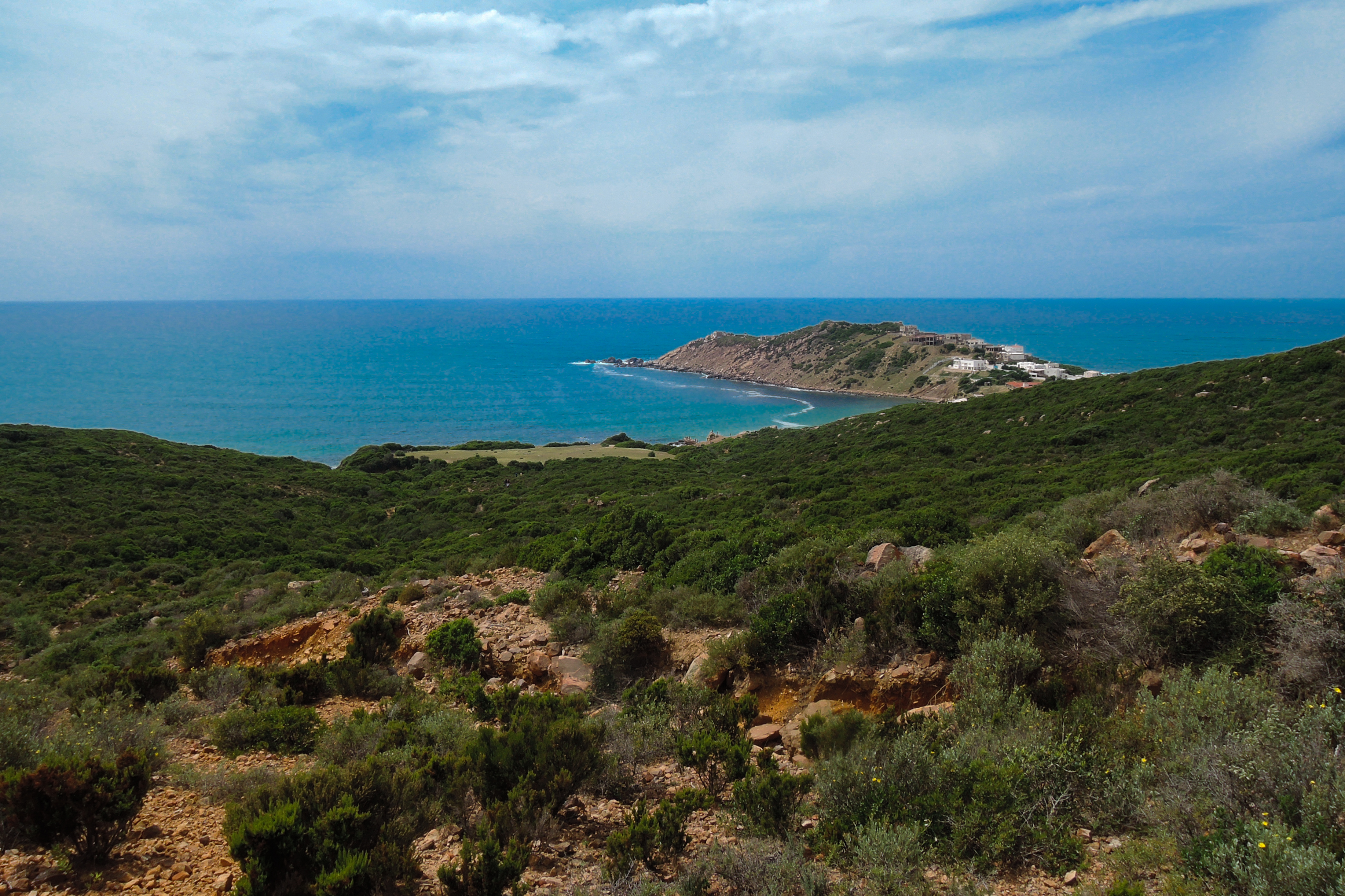 Cap negro